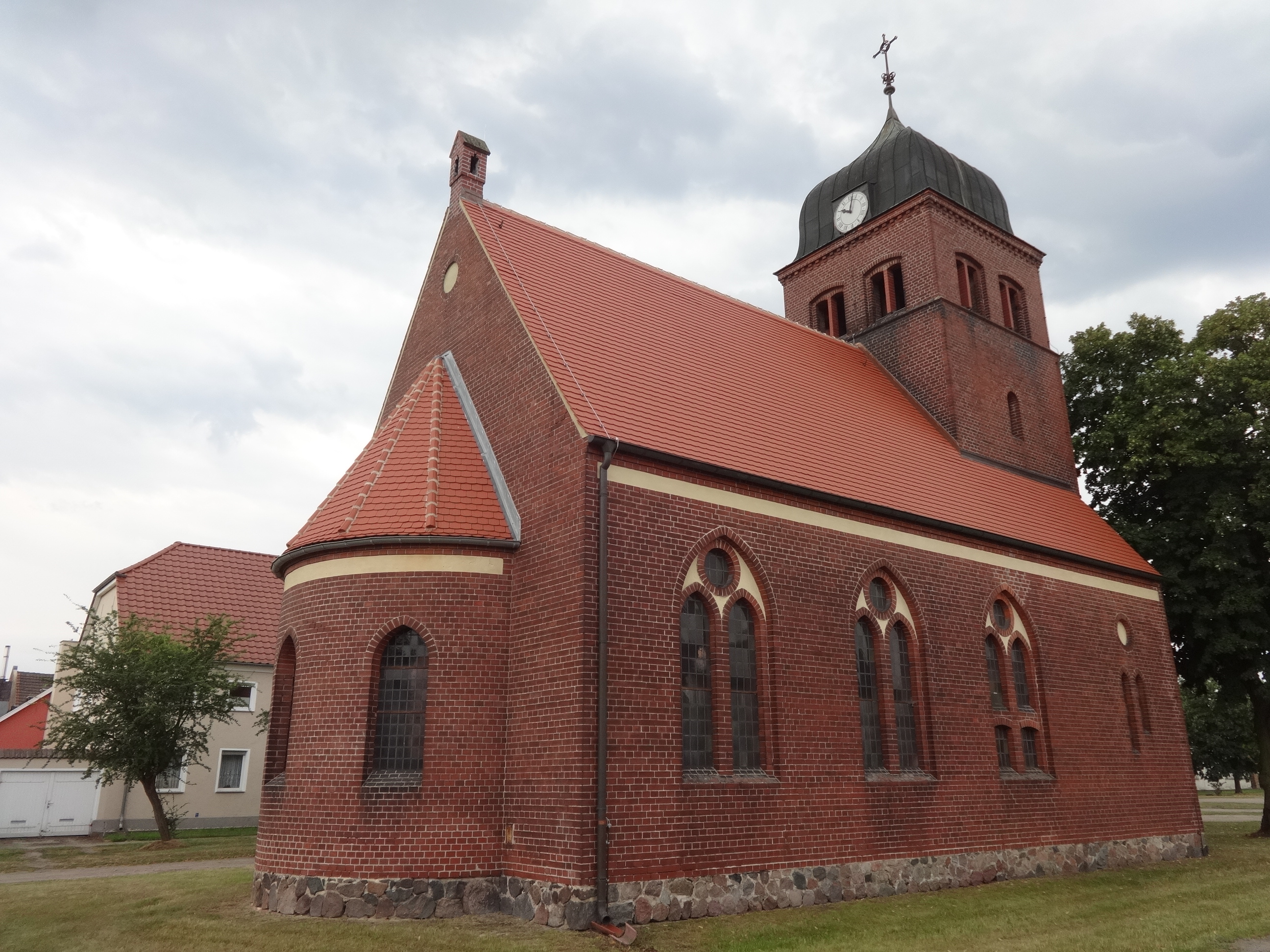 Die Dorfkirche in Ruhlsdorf ist ein neugotischer Backsteinbau aus dem Jahr 1904. Im Innern befindet sich eine bauzeitliche Ausstattung.